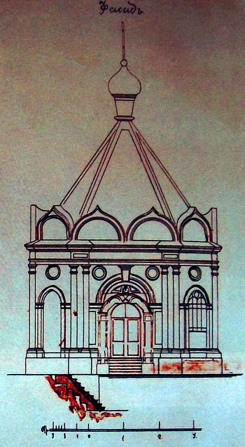 Схема фасада Крестовоздвиженской часовни (Самара)